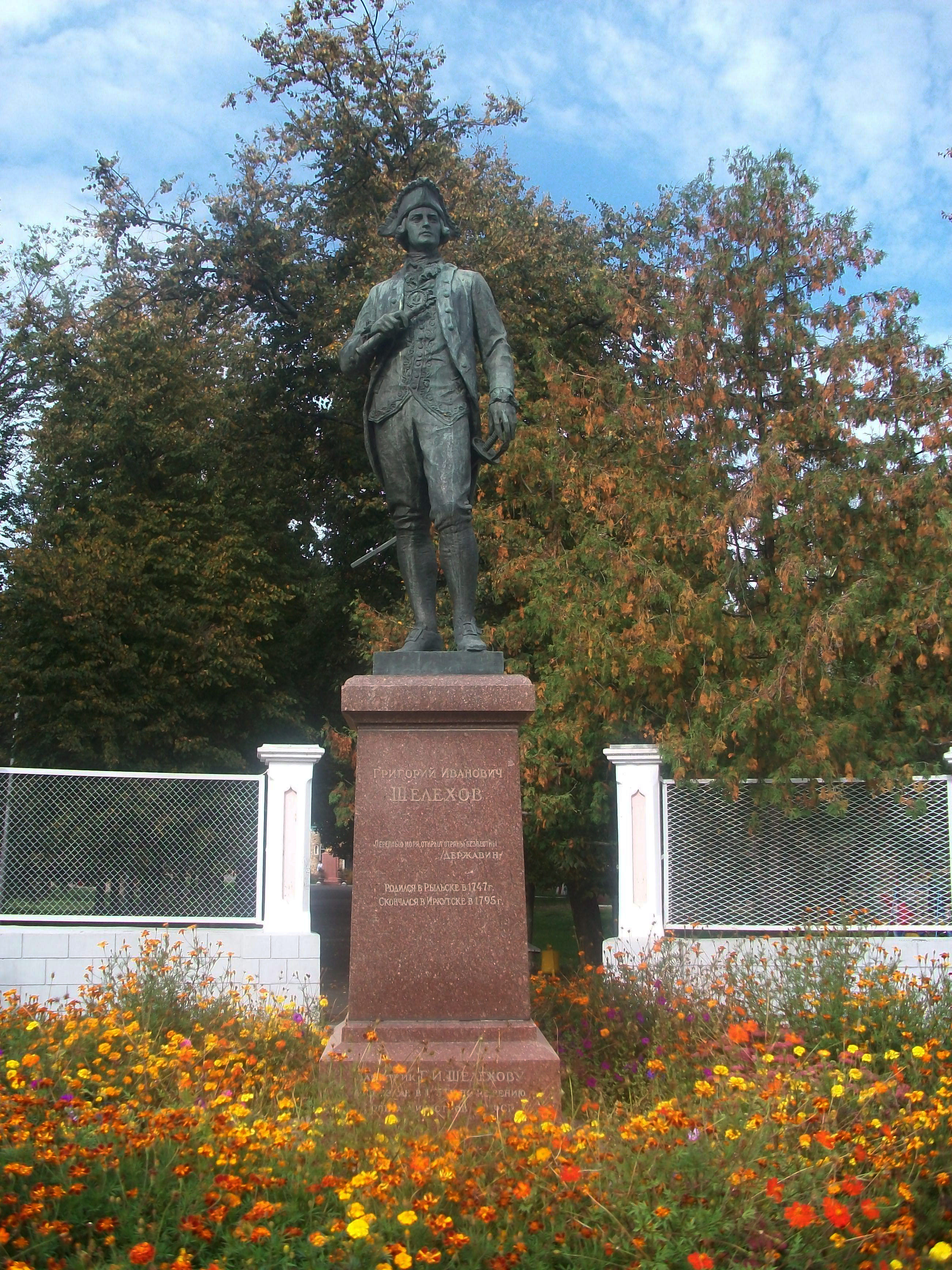 Памятник Г.И. Шелехову